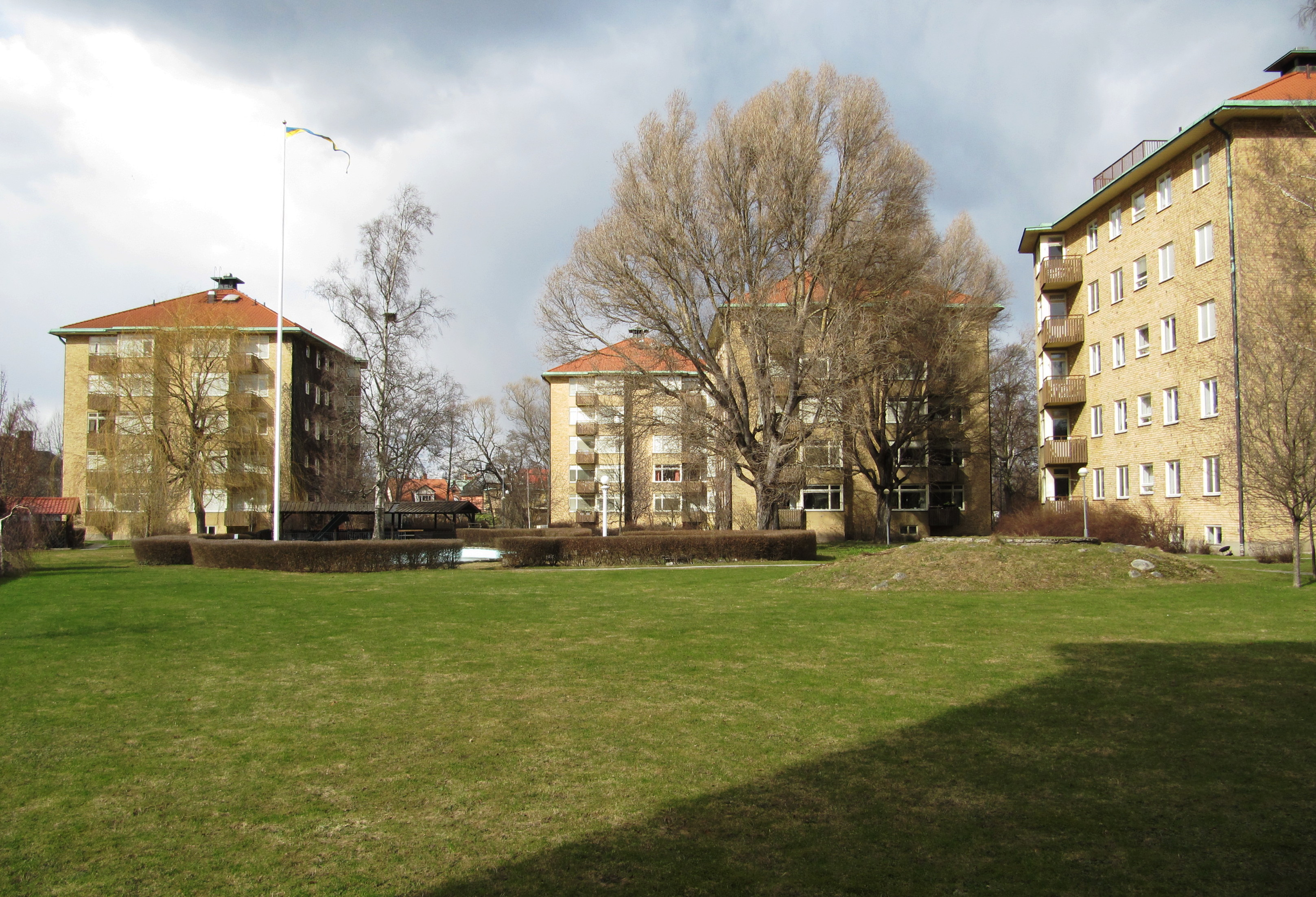 Hagabrohus bostadsområde, Örebro